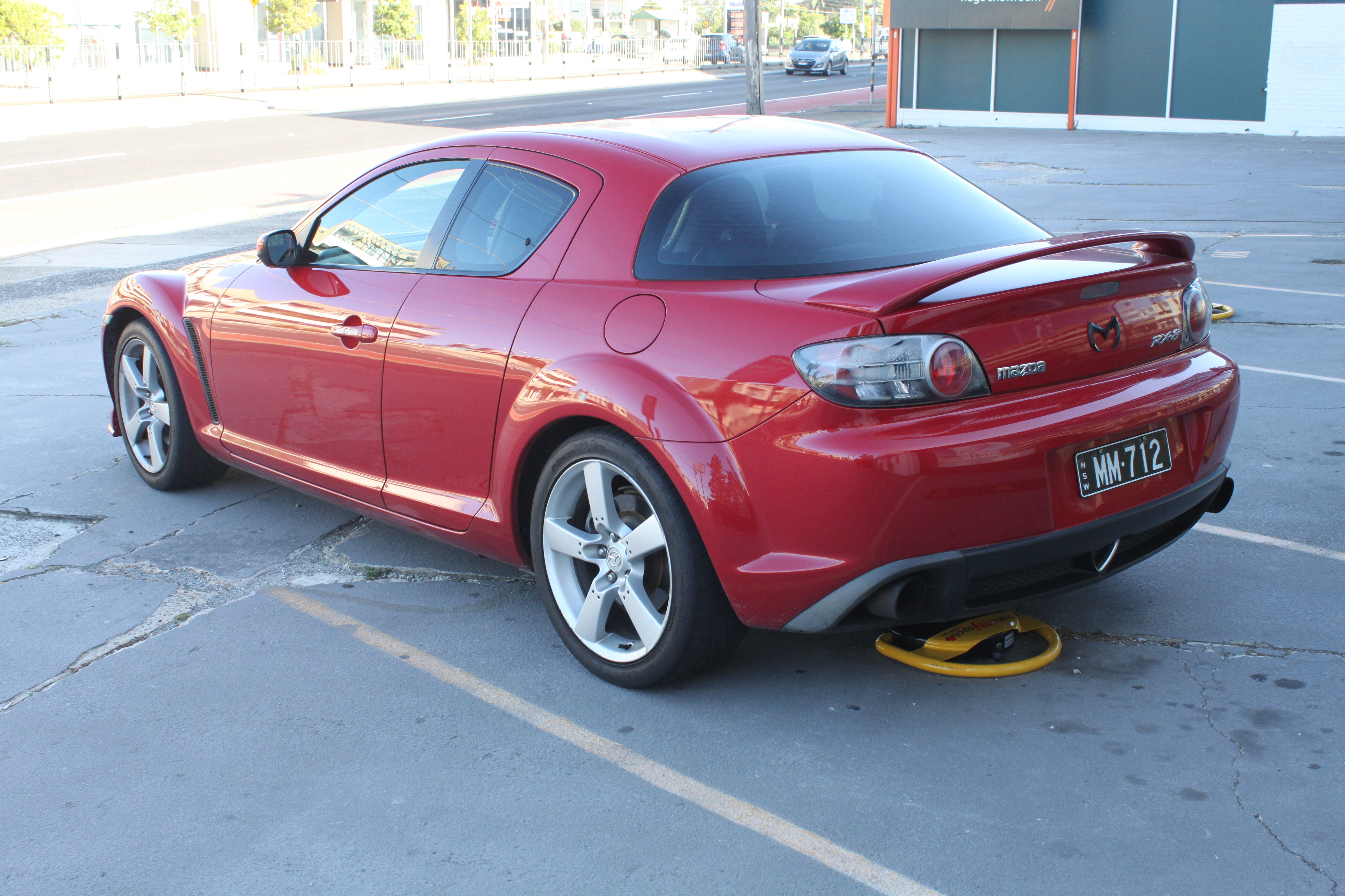 Mazda RX-8